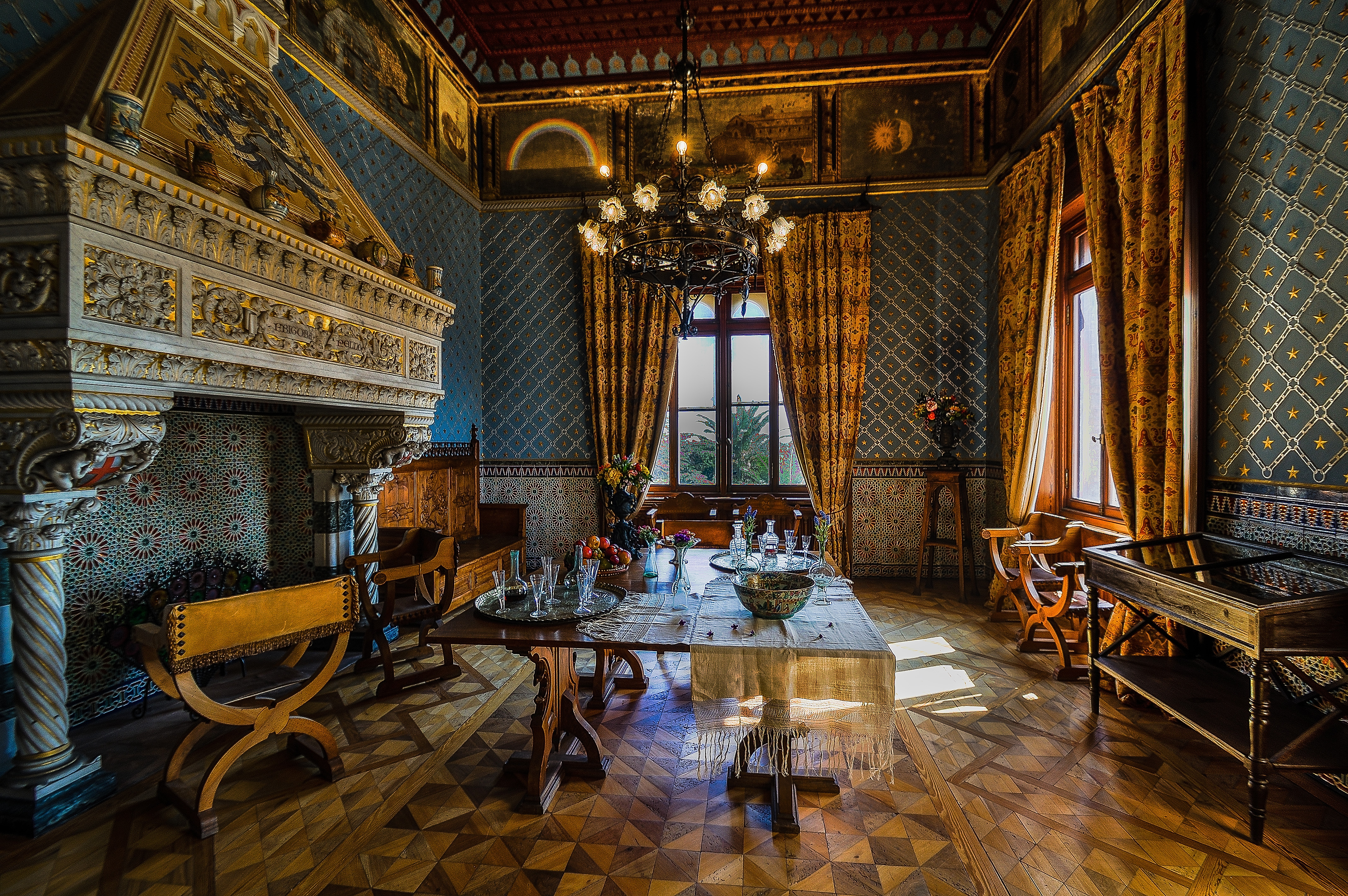 Museo delle culture del mondo This is a photo of a monument which is part of cultural heritage of Italy.